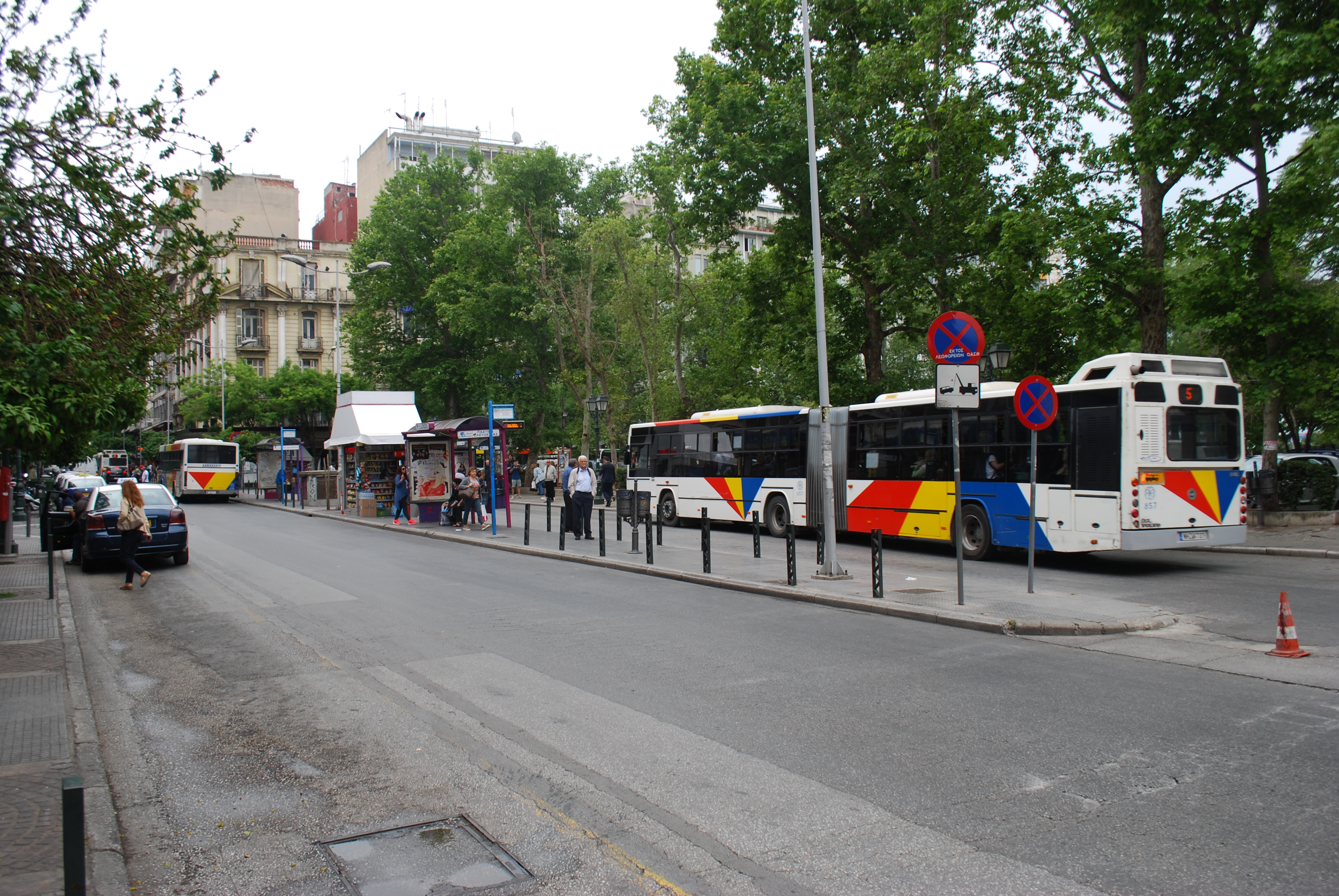 Vue de Thessalonique.